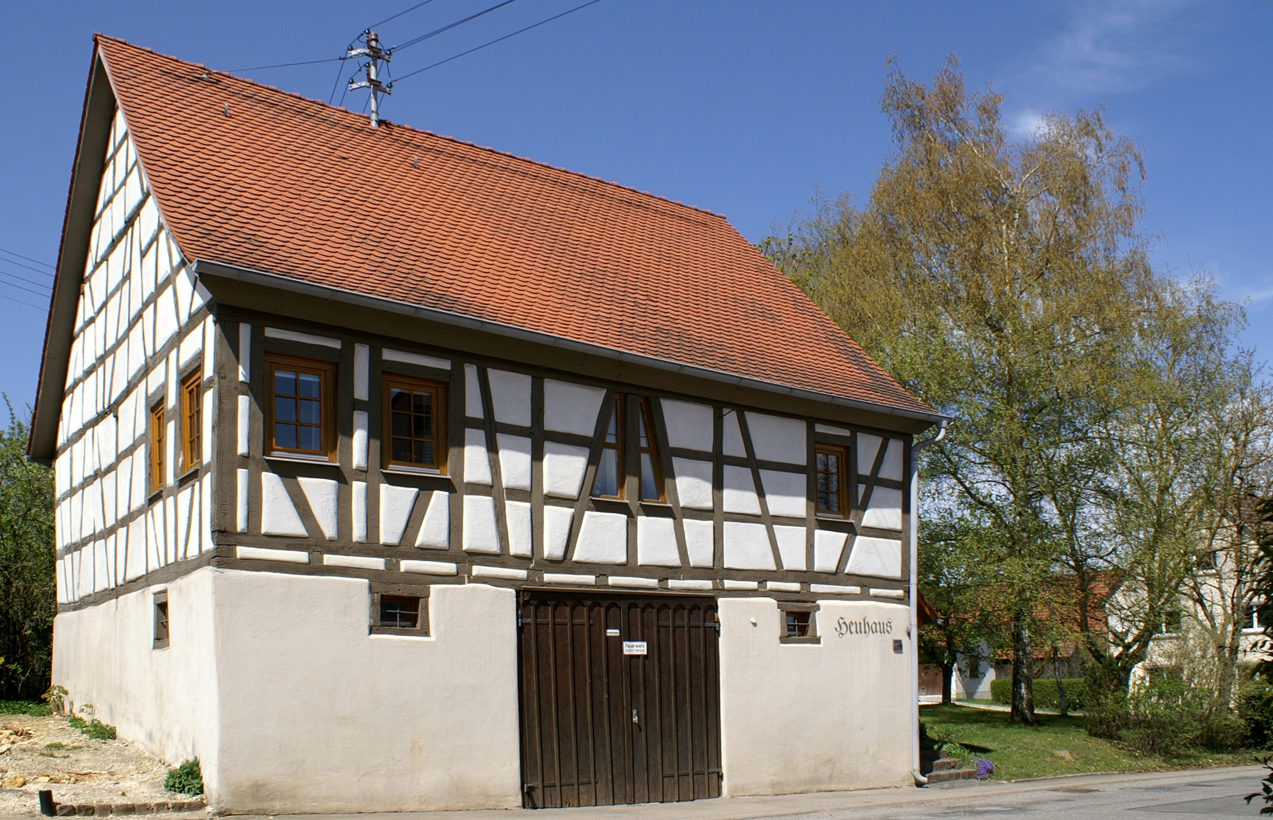 Das Heuhaus in Bühlenhausen ist Treffpunkt für Vorträge und Diskussionsveranstaltungen der Landfrauen Bühlenhausen-Treffensbuch